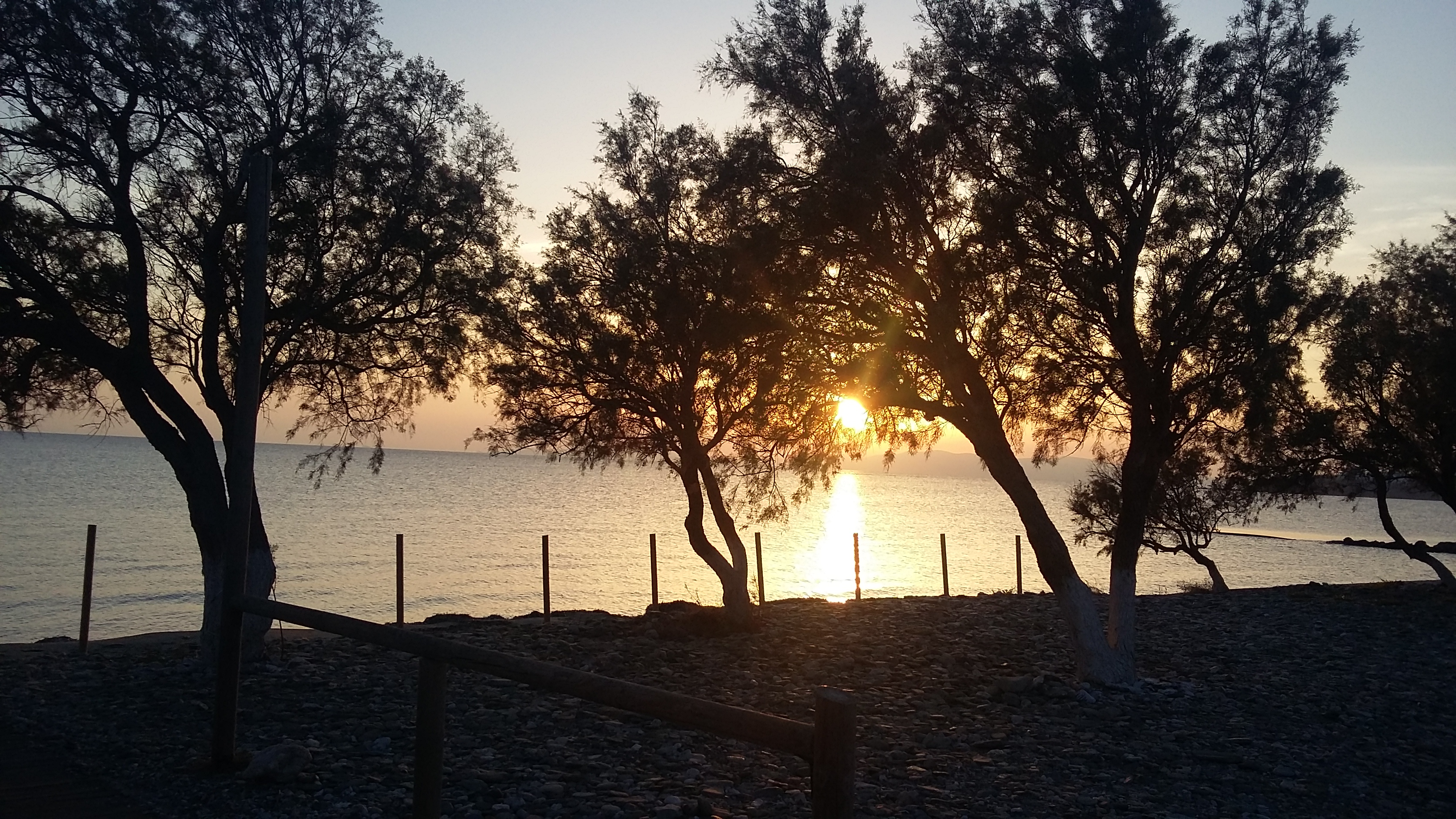 Ένα υπέροχο ηλιοβασίλεμα!